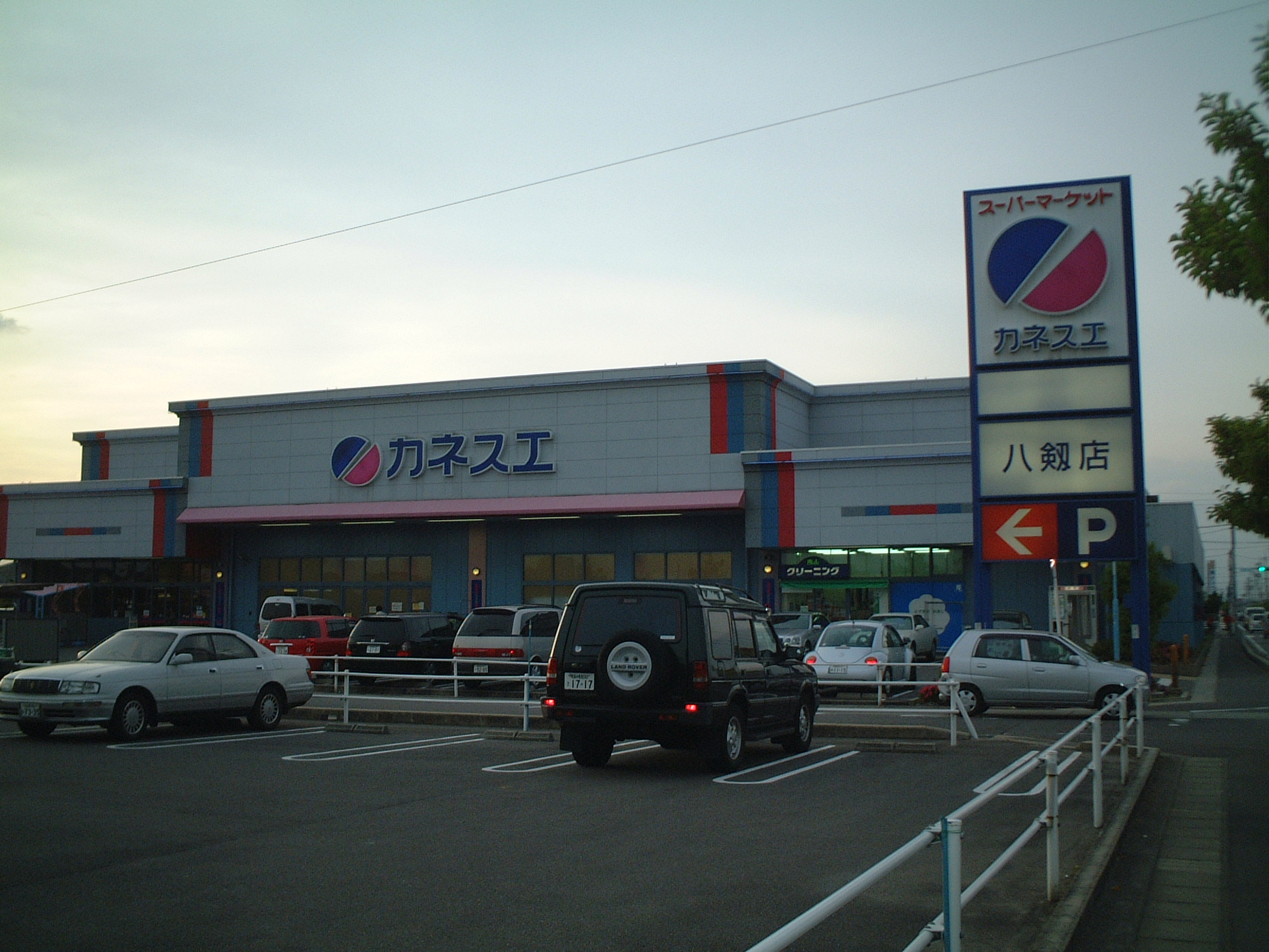 カネスエ八剣店の画像